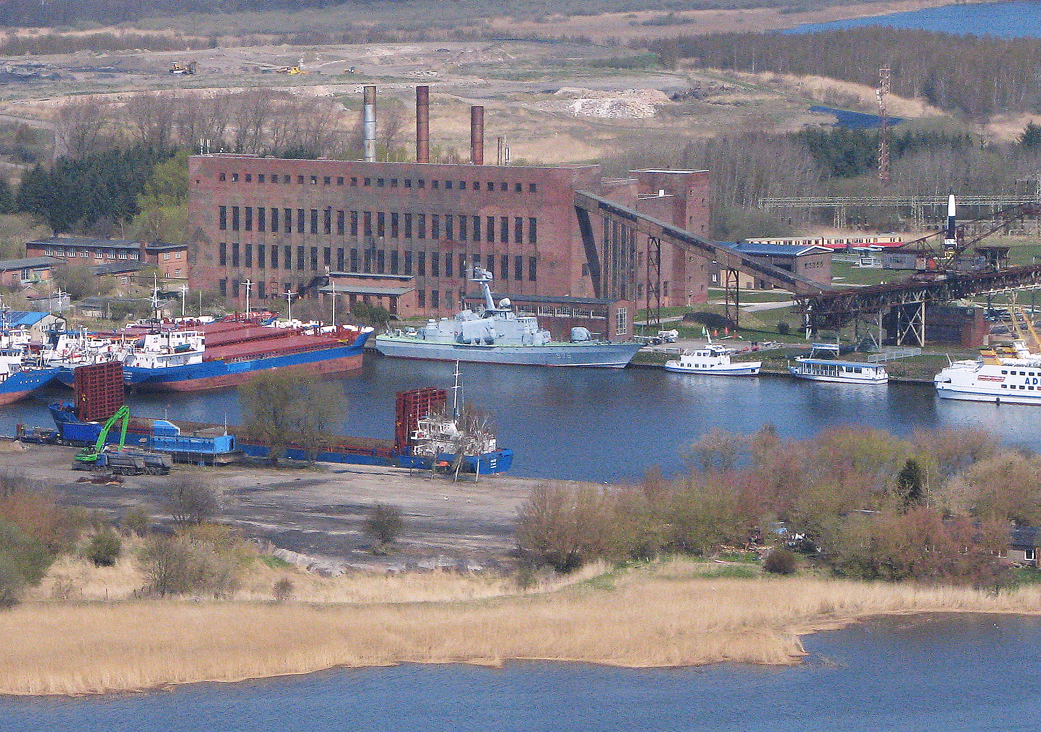 Luftbild vom erhaltenen Kraftwerk der ehemaligen Heeresversuchsanstalt Peenemünde, erbaut 1939-1943. Viele andere Bauwerke wurden nach Ende WW2 gesprengt. Ein großes Baudenkmal in Mecklenburg-Vorpommern (Nutzung bis zur Wiedervereinigung). Foto Wolfgang Pehlemann IMG_4389